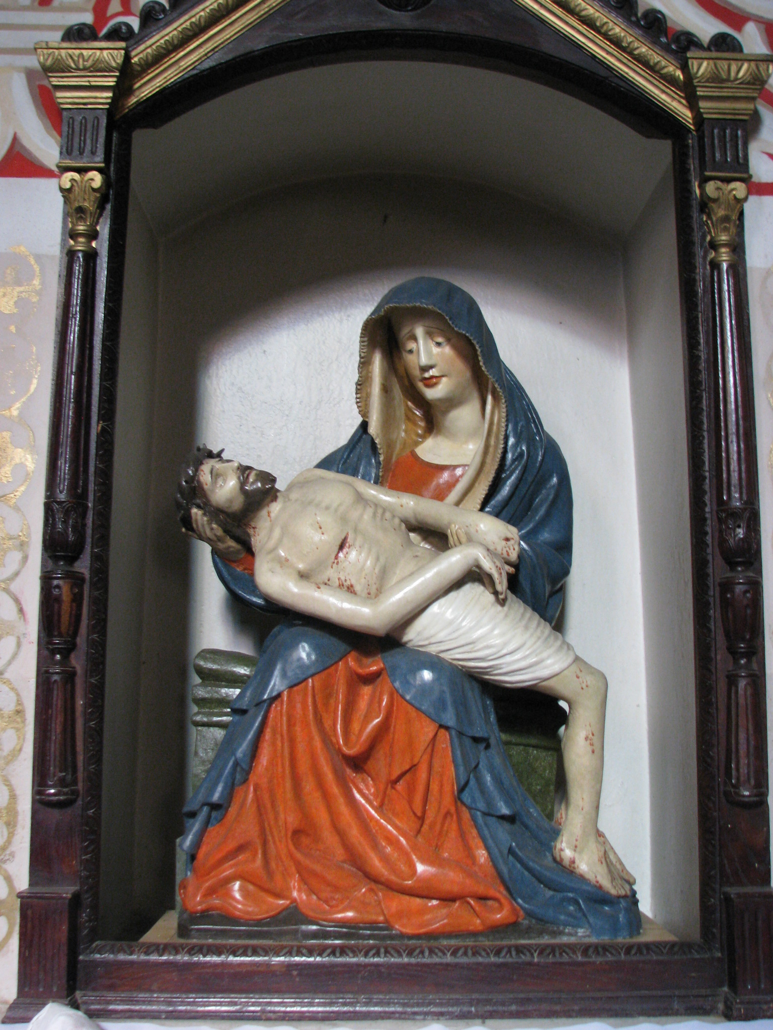 Szreńsk, kościół, tzw Pieta ze Szreńska, rzeźba gotycka XIV w, około 1430-1440